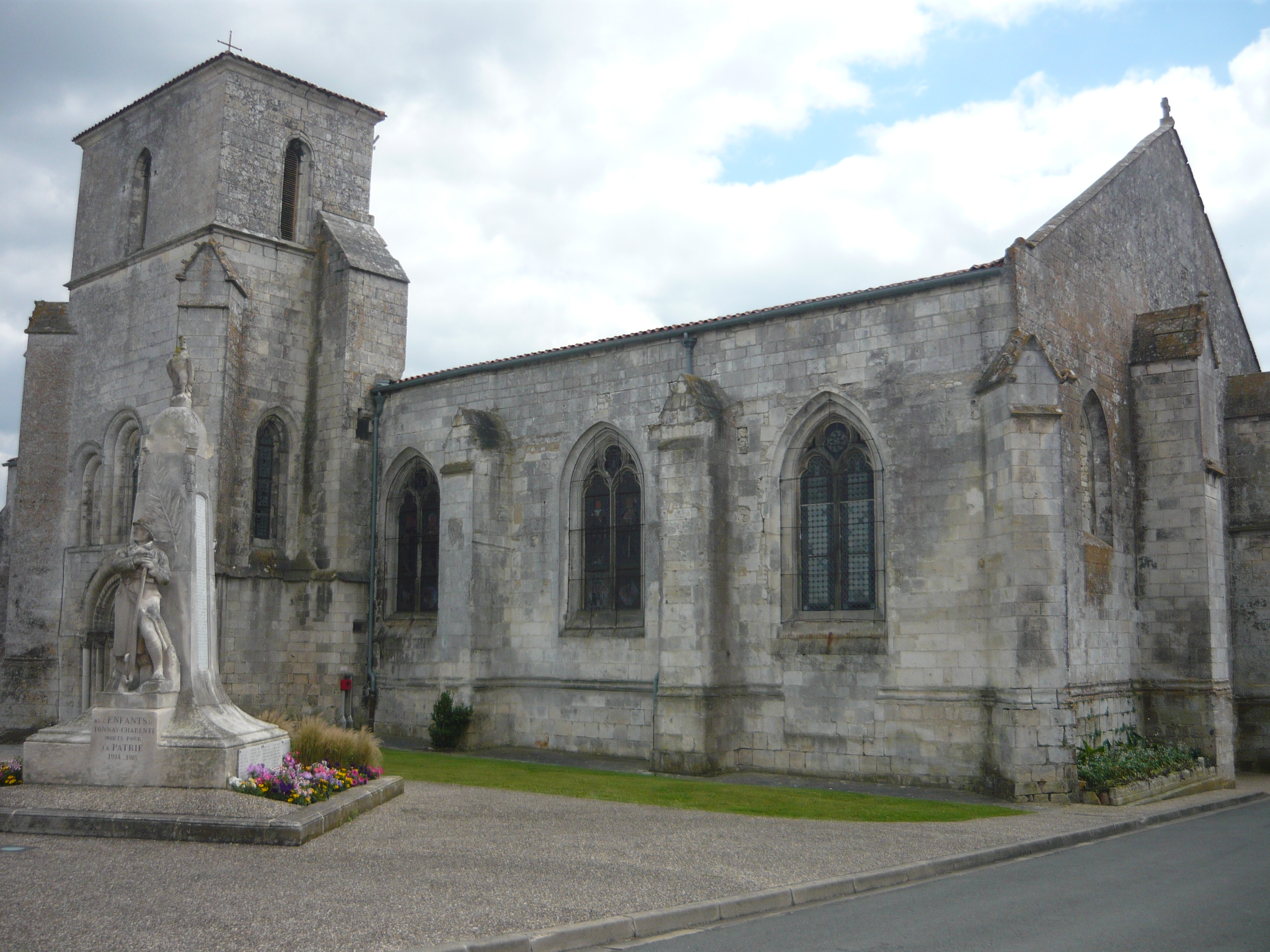 L'église Saint-Etienne de Tonnay-Charente